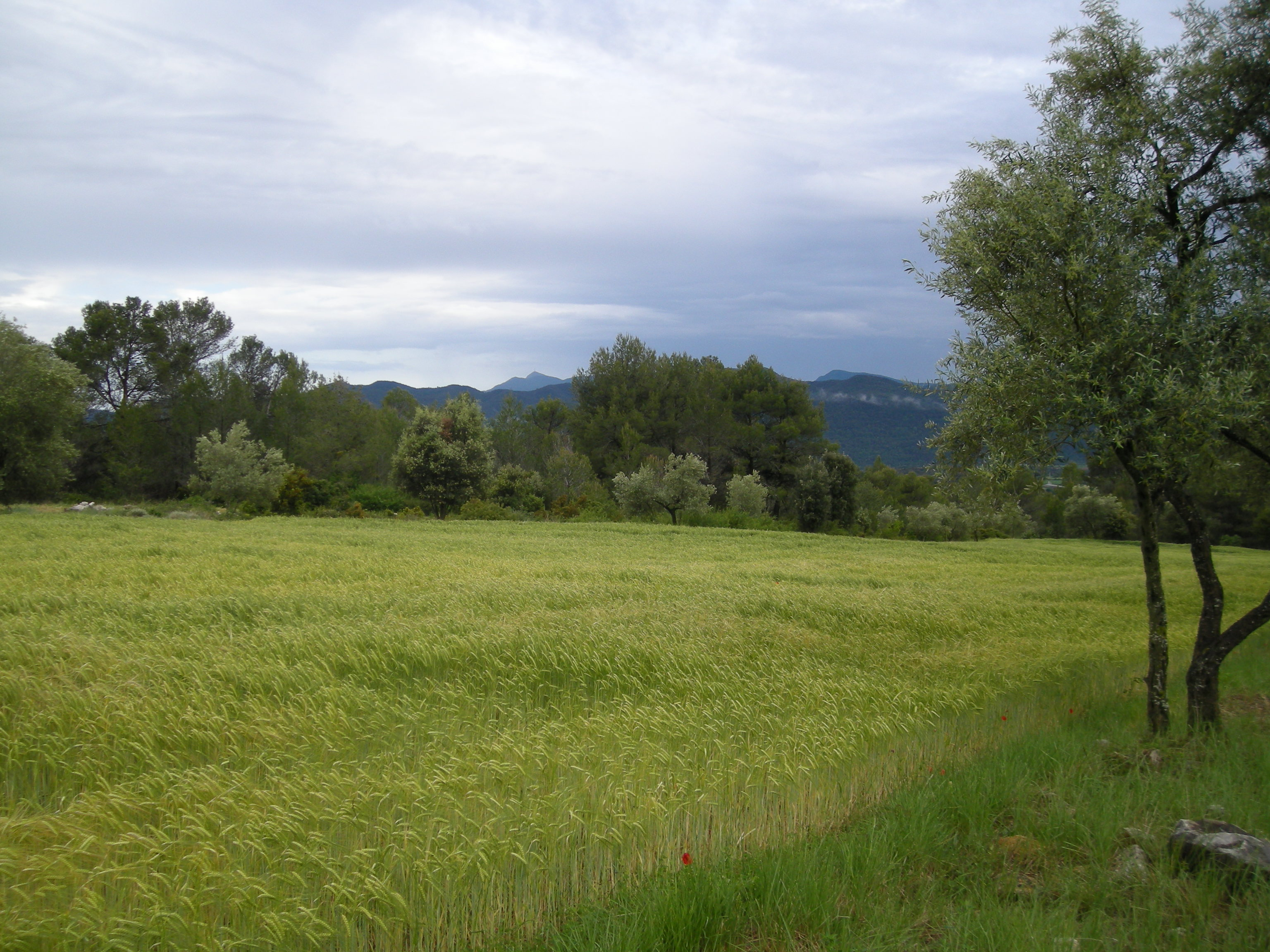 Camp de blat i olivera